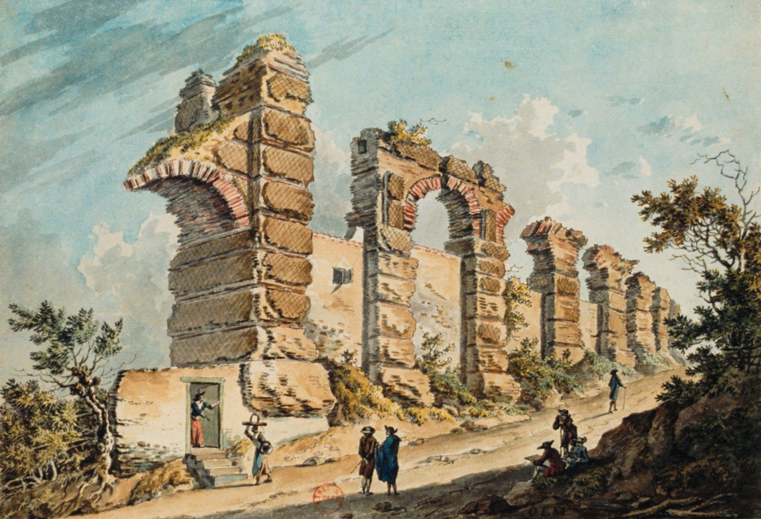 Restes d'un aqueduc bâti par les Romains à la porte de St-Just à Lyon.